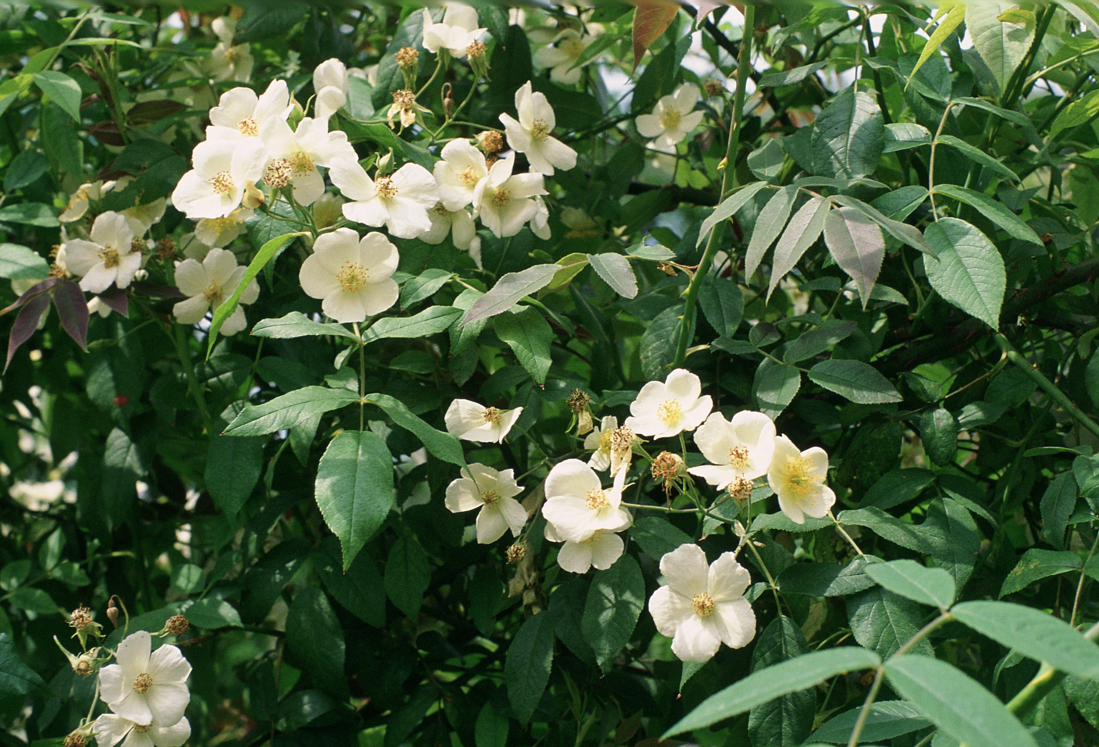 Rosa moschata, sect. Synstylae. Real Jardín Botánico, Madrid